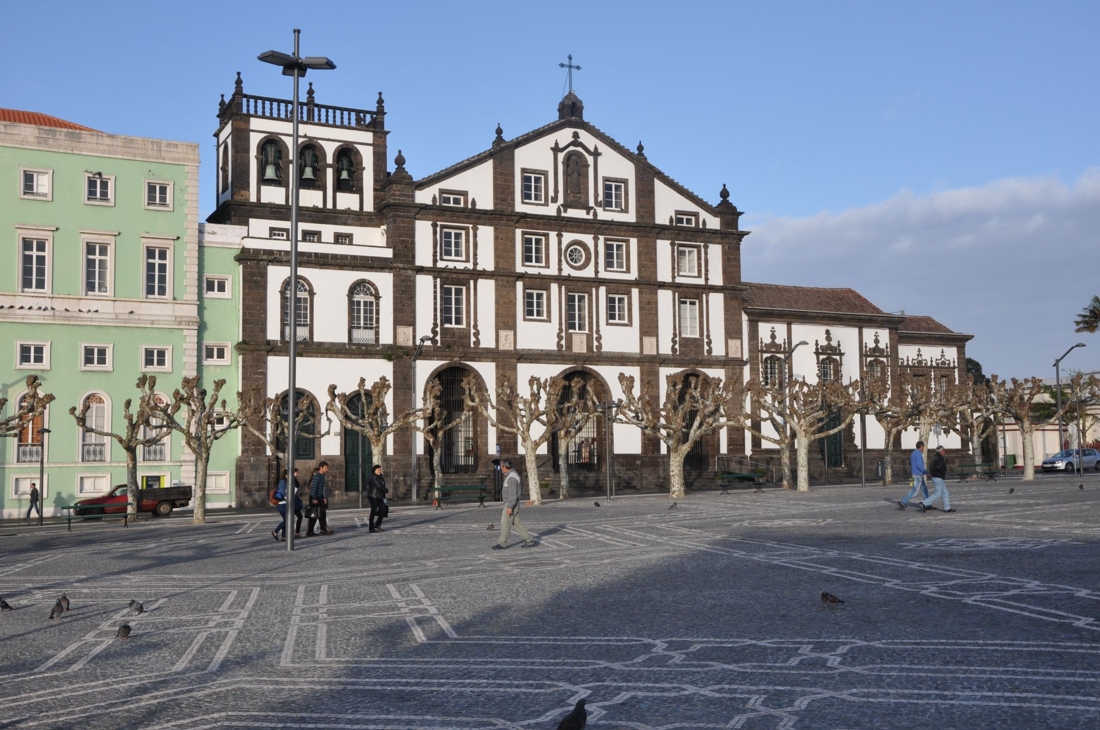 São Miguel, Ponta Delgada